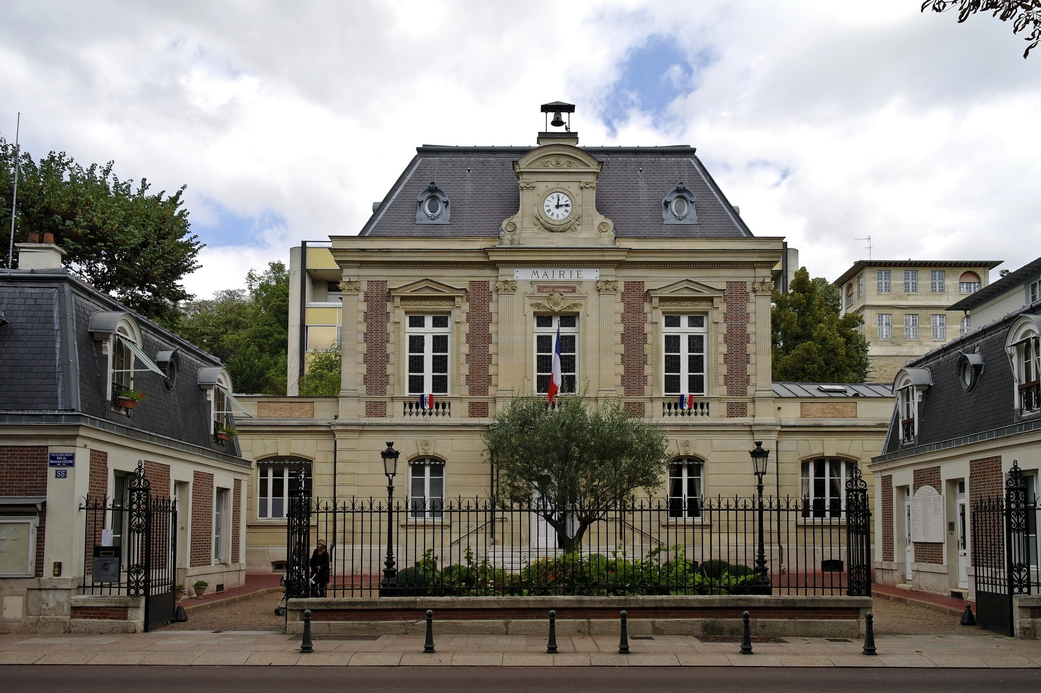 Mairie de Saint Maurice (94)